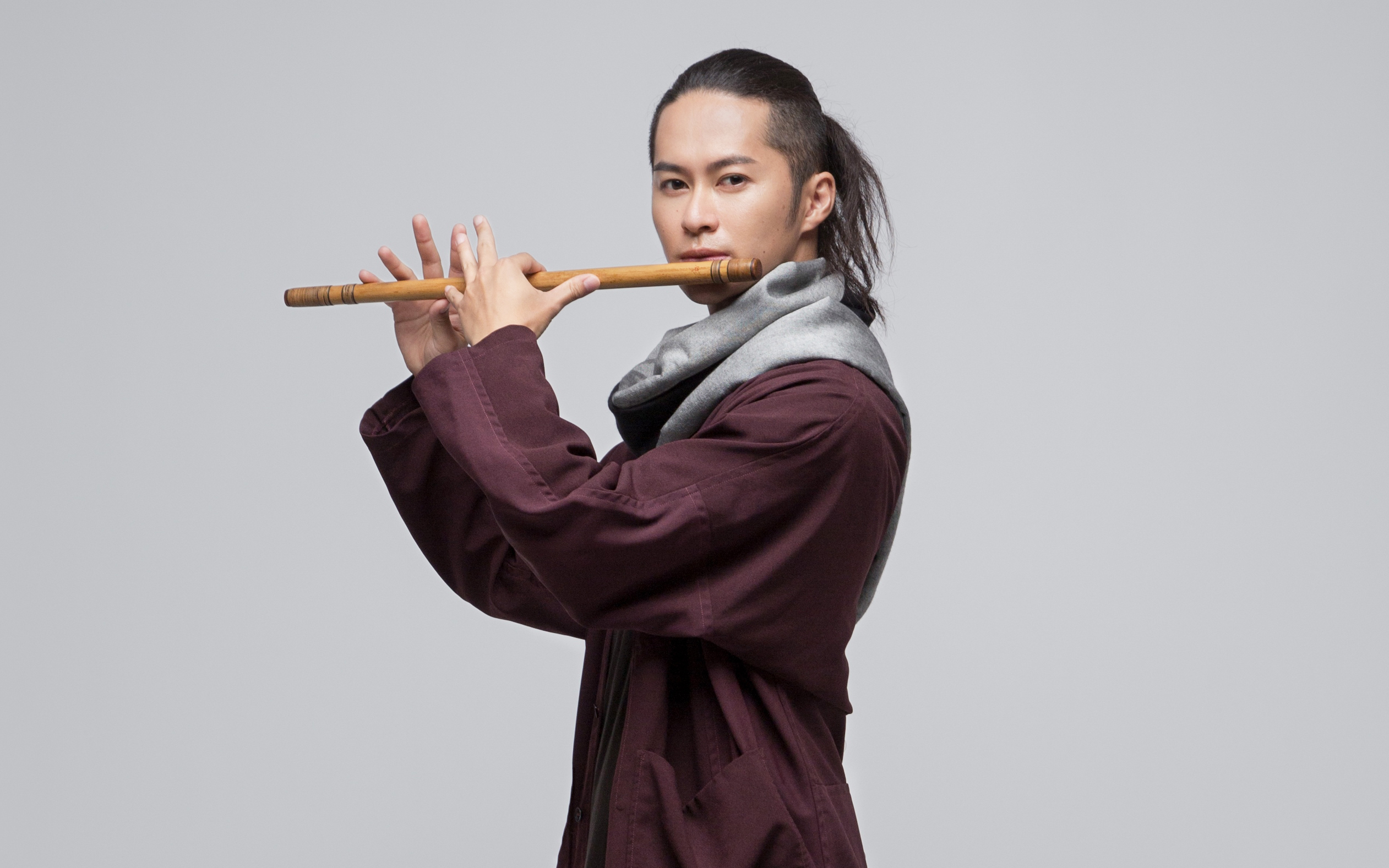 篠笛奏者 佐藤和哉（Kazuya Sato）